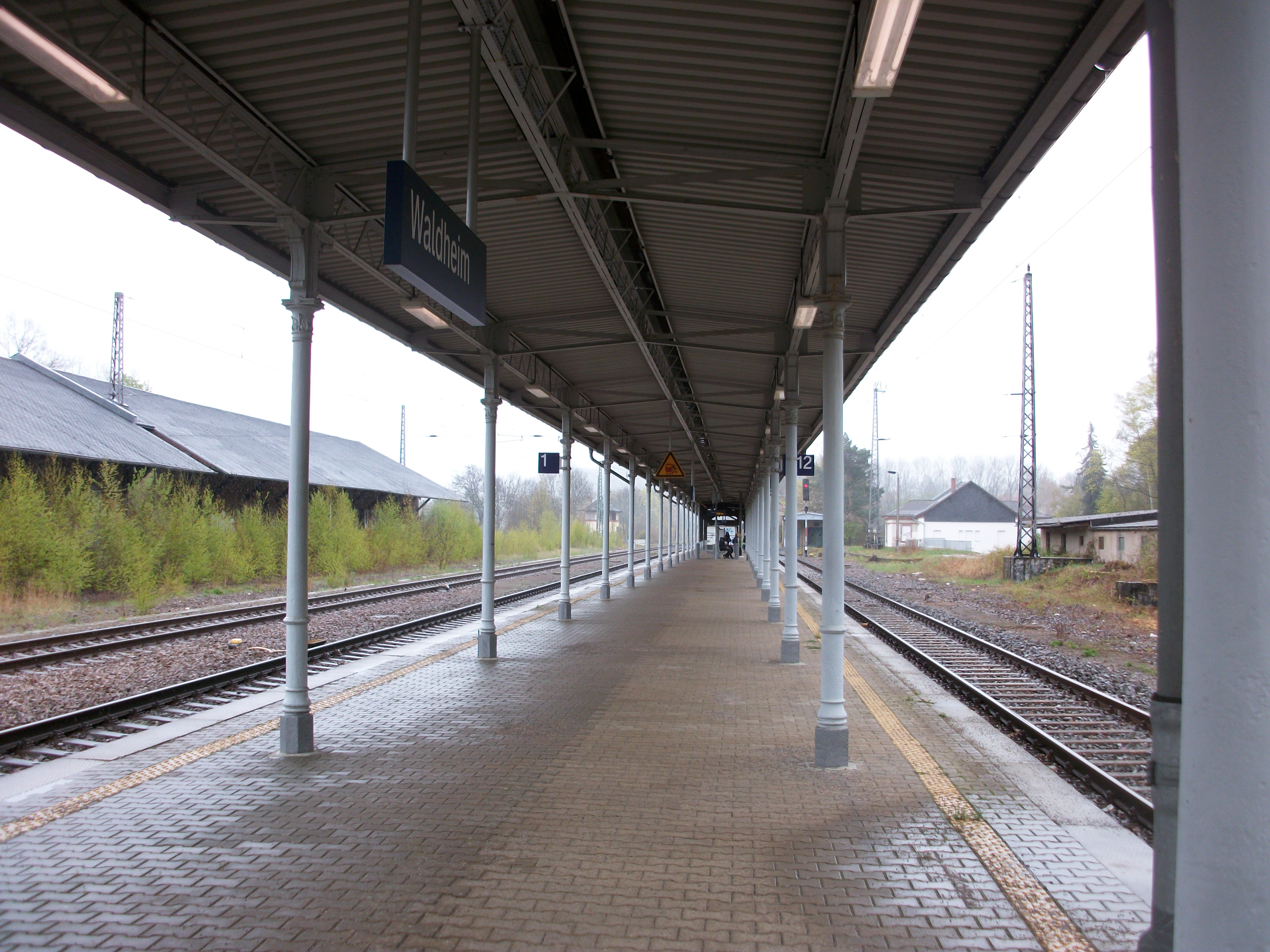 Bahnhof Waldheim, Bahnsteige (2016)